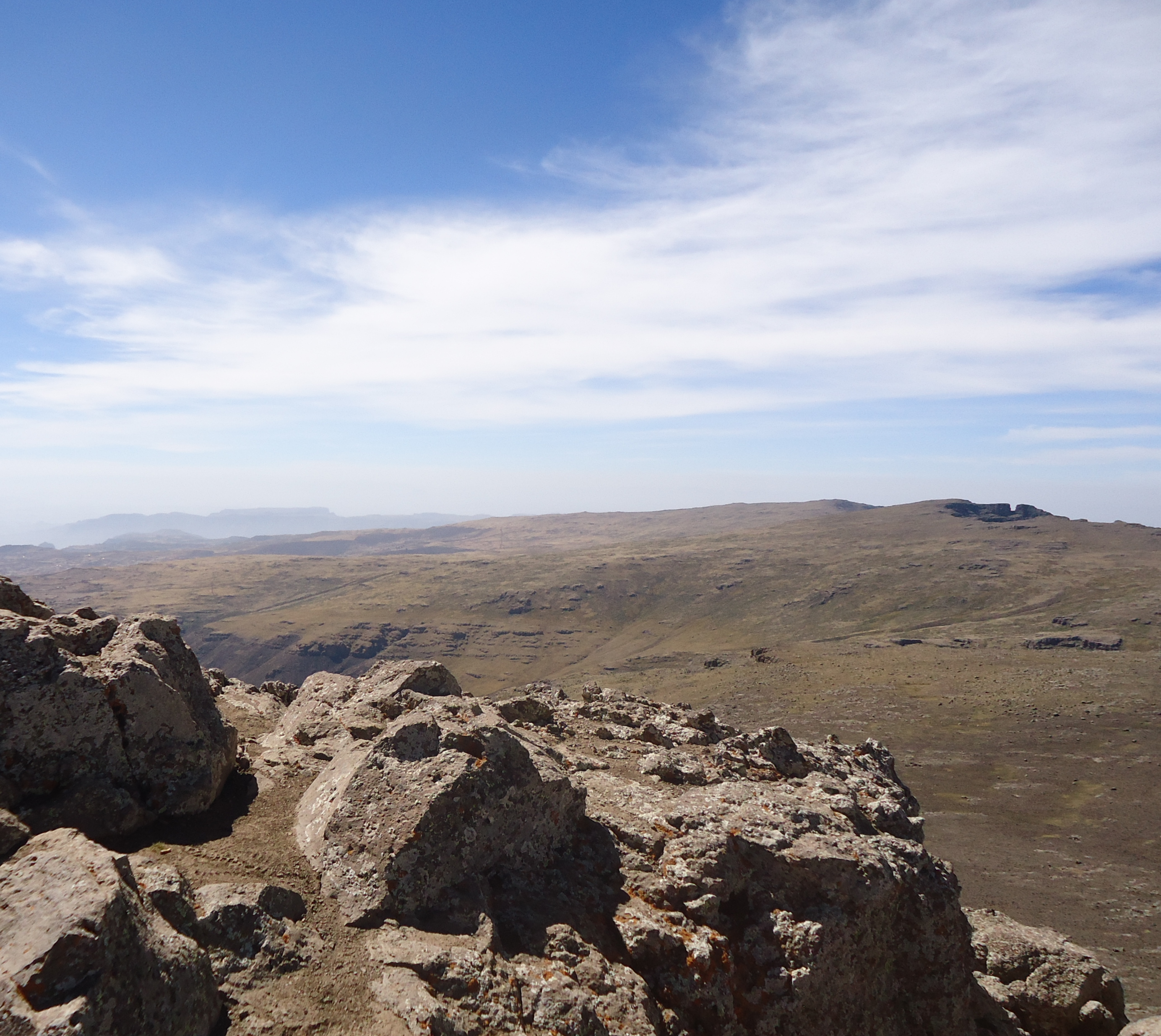 Blick in südliche Richtung